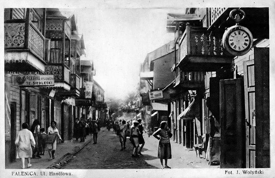 Ulica Handlowa (obecnie Walcownicza) w Falenicy (obecnie część Warszawy)